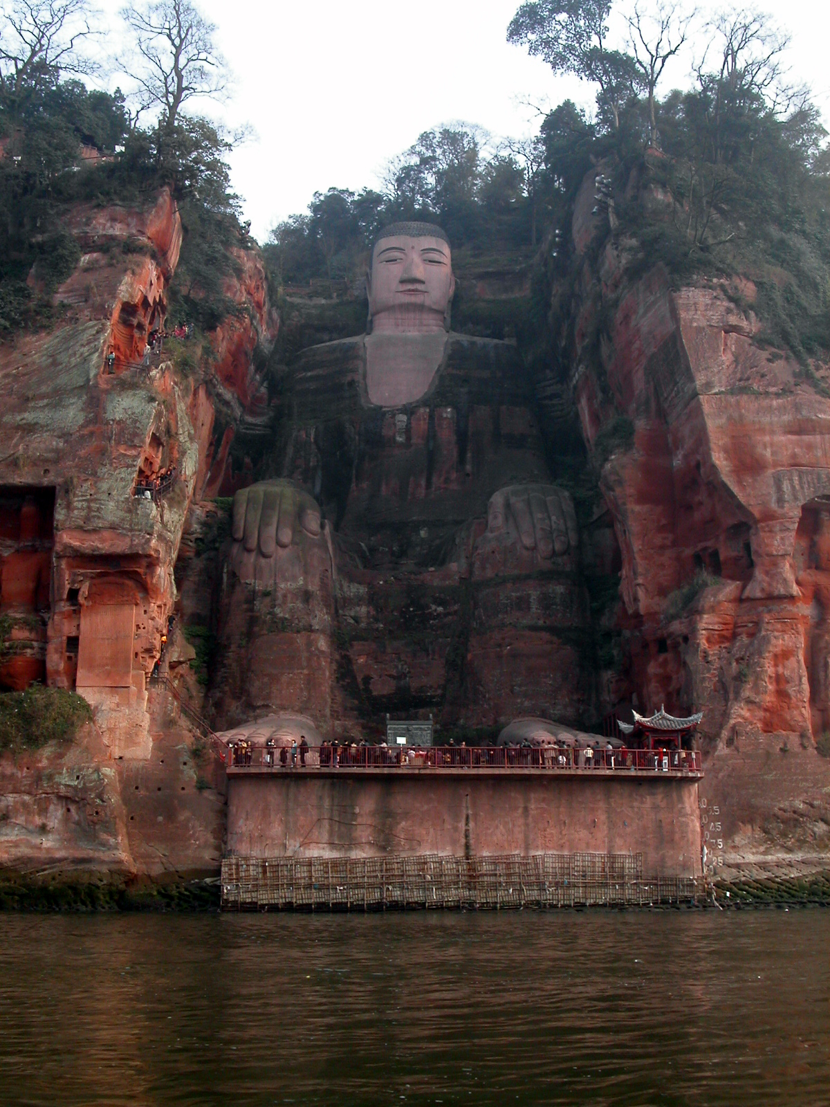 Leshan giant buddha